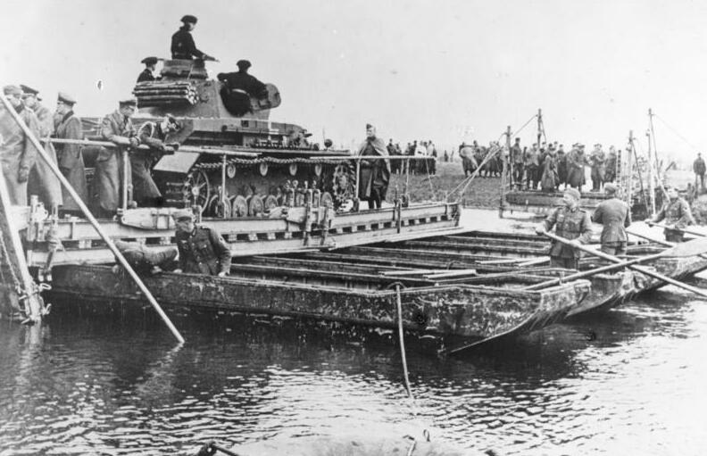 Sicher gleitet die Pontonfähre mit dem Stahlkoloss zum anderen Ufer